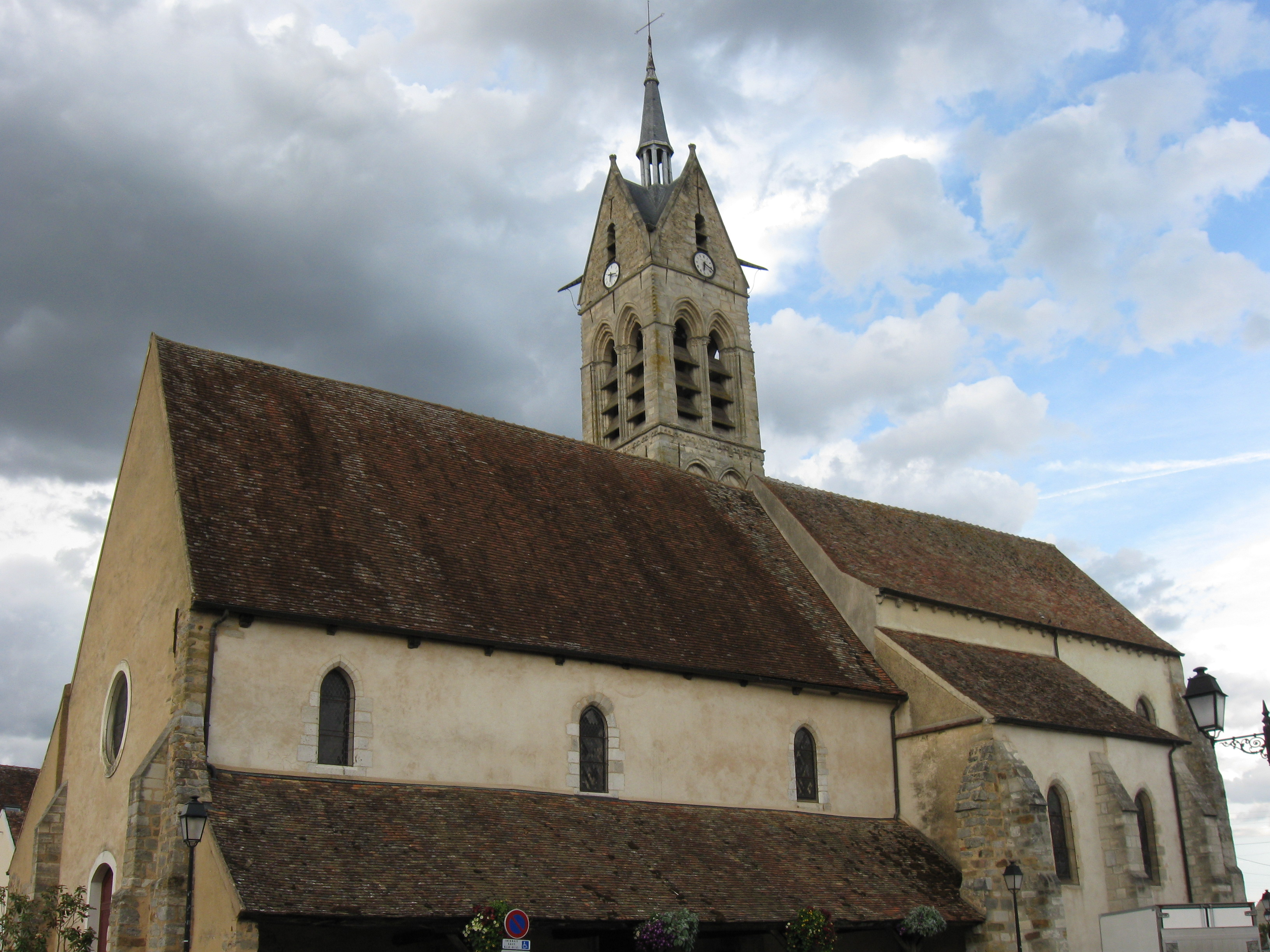 Église Sainte-Marie-Madeleine du Châtelet-en-Brie. (Seine-et-Marne, région Île-de-France).